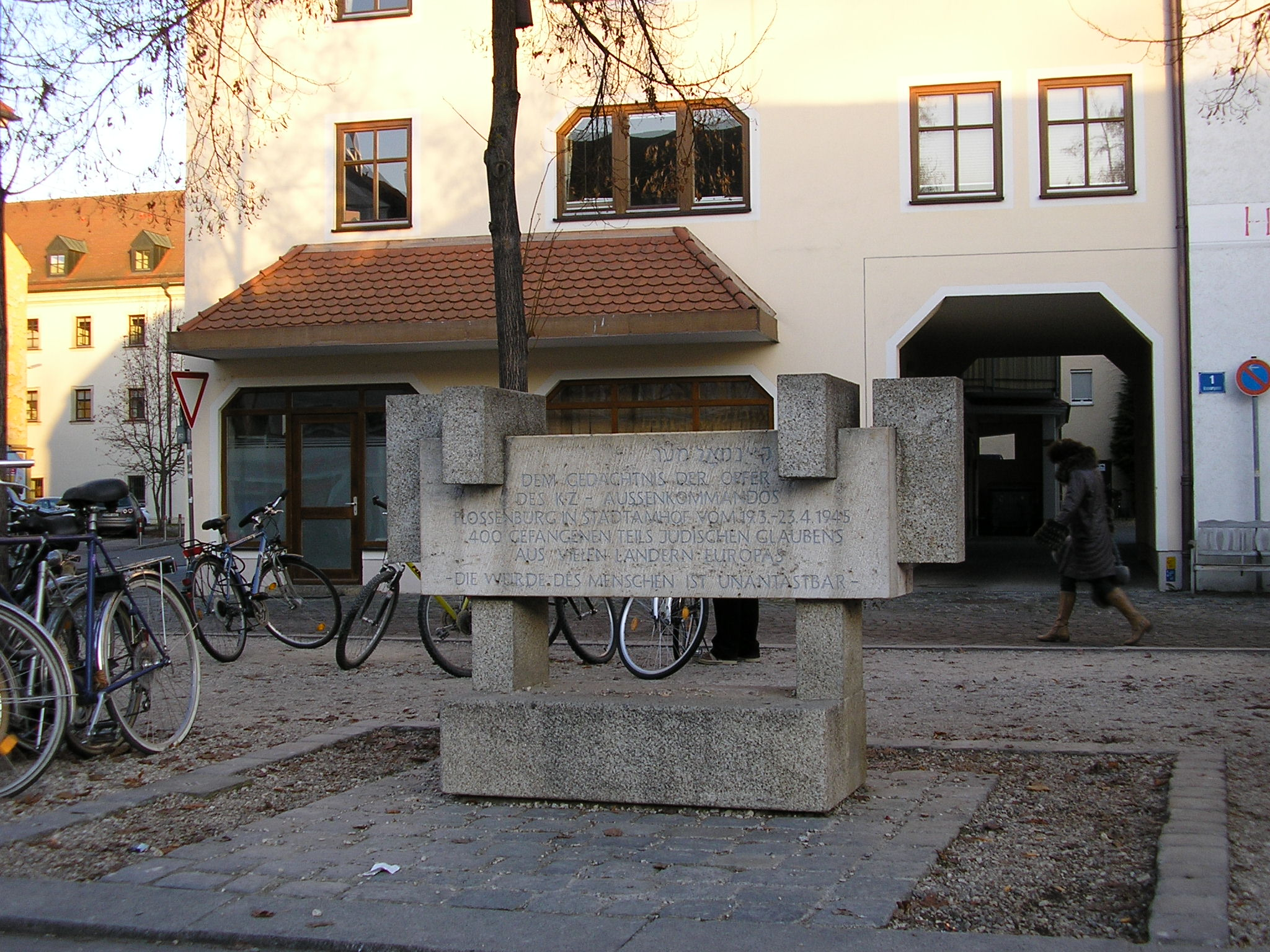 Gedenkstein für die Opfer des Außenkommandos KZ Flossenbürg (1945) in Stadtamhof errichtet von der Stadt Regensburg (1994)